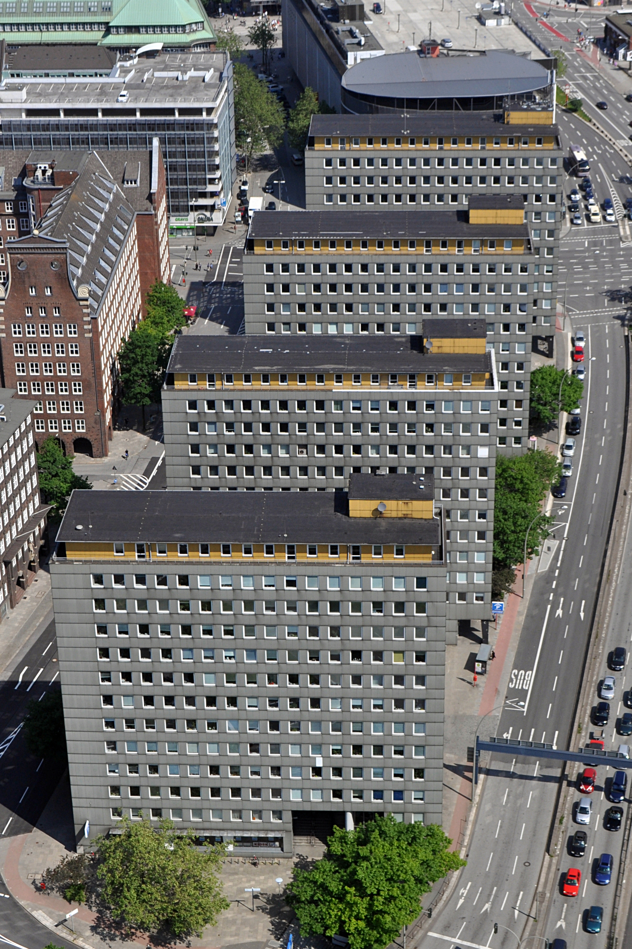 Die City-Hof in Hamburg-Altstadt. This is a photograph of an architectural monument.